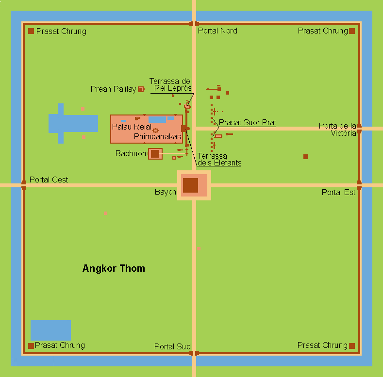 Esquema d’Angkor Thom. Angkor, Cambodja